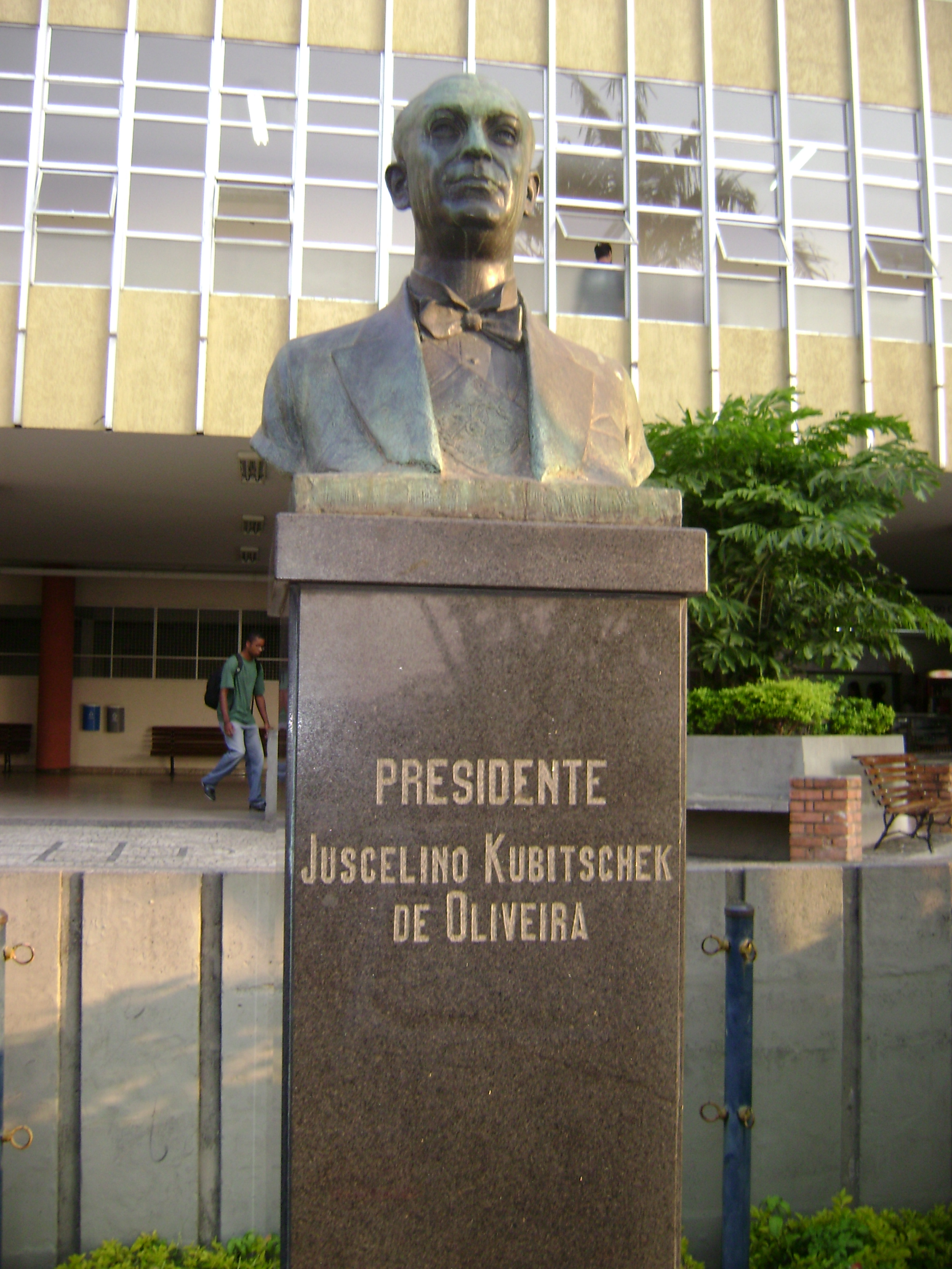 Estátua do presidente JK no campus I do Cefet-MG, em Belo Horizonte.